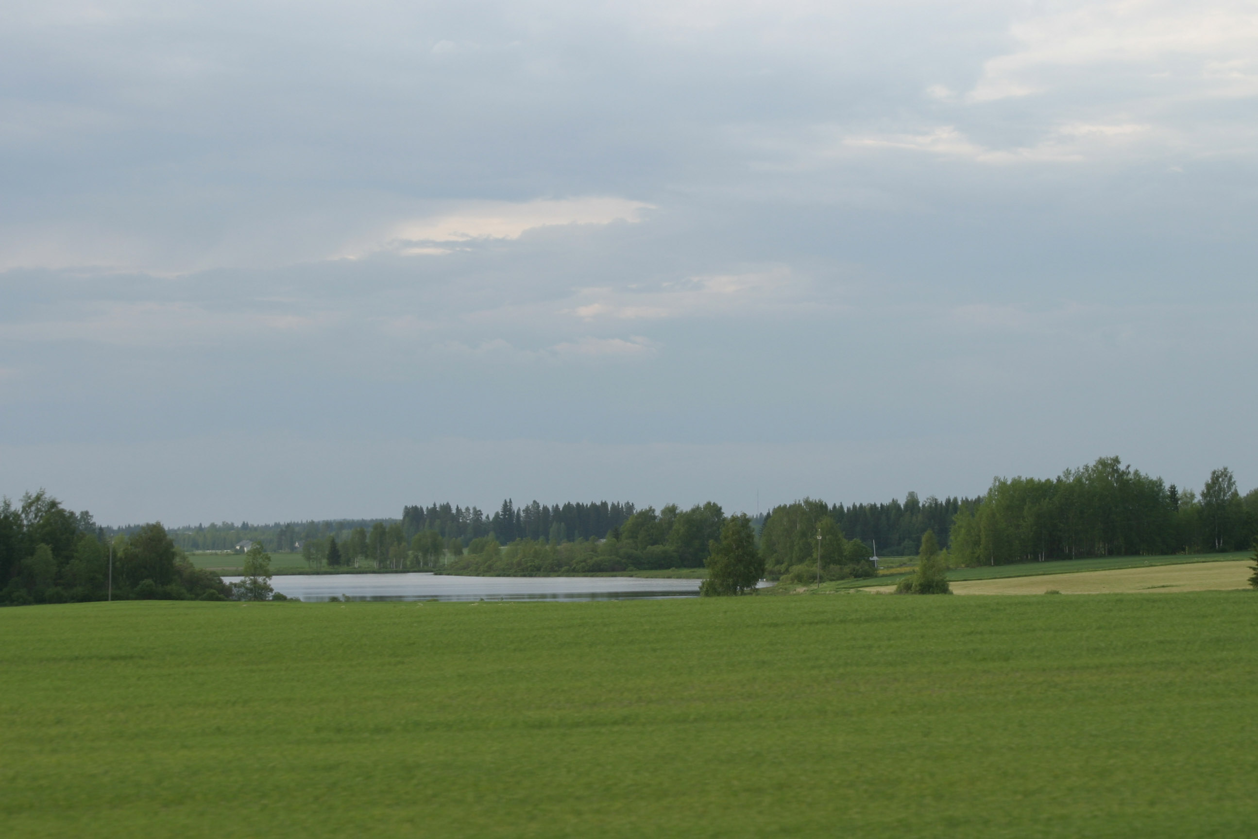 Maisemakuvaa Rapakkojoelta, Kiuruvedeltä